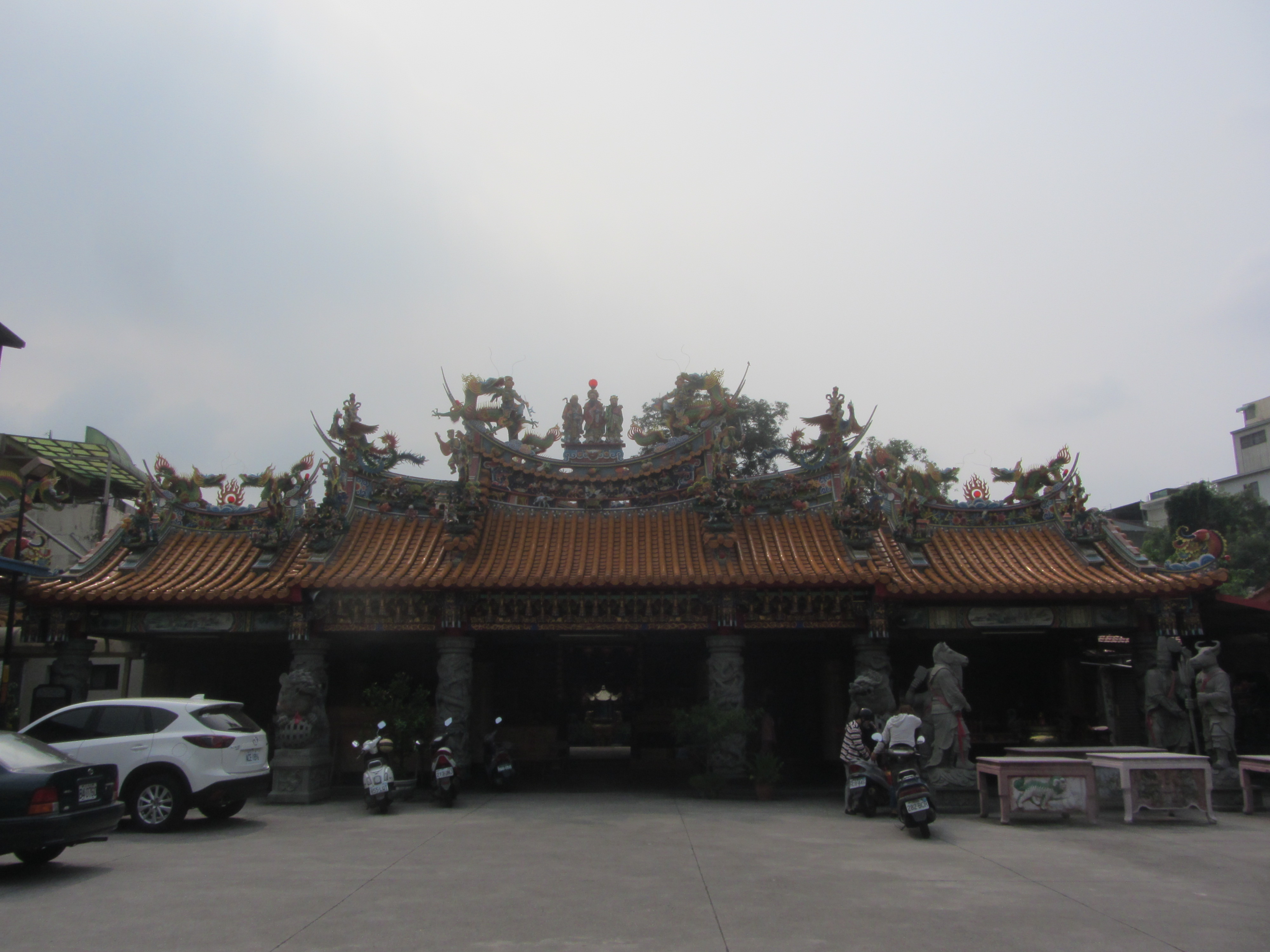 南投配天宮